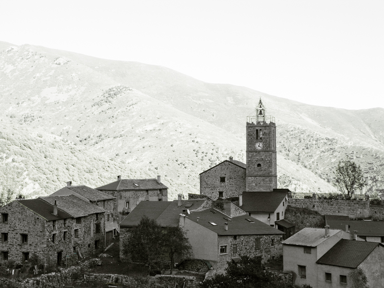 Railleu, Pyrénées-Orientales